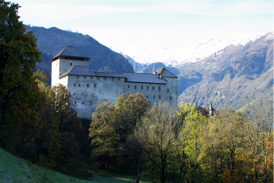 Burgruine Kaprun